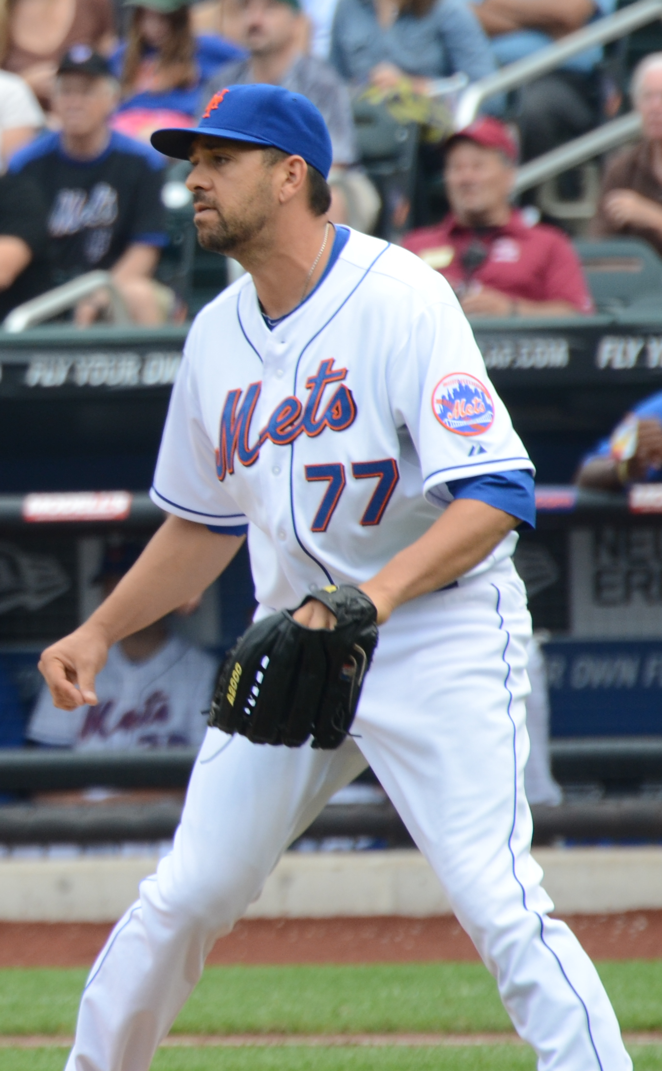 D. J. Carrasco